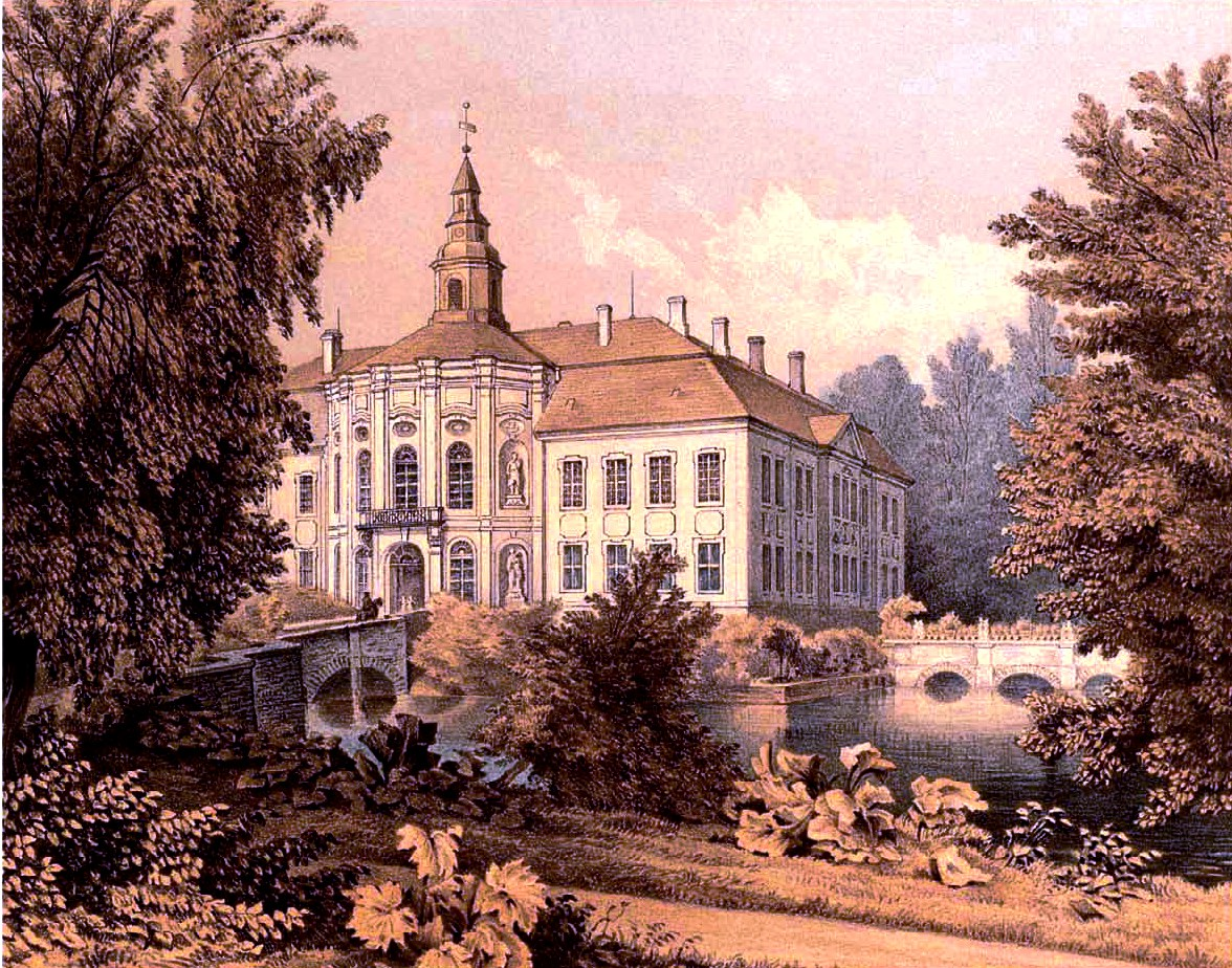 Schloss Jahmen, Kreis Rothenburg, Provinz Schlesien, Lithographie aus der Sammlung Duncker